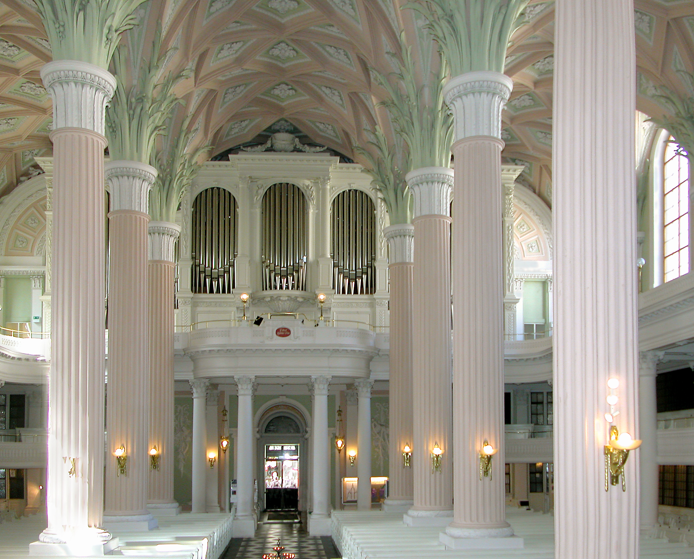 08.09.2009 04109 Leipzig, Nikolaikirche (GMP: 51.340321,12.378483): Um 1165 gegründet, heutiger Bau Anfang des 16. Jahrhundert. Innenraum entstand durch Umbau in den Jahren 1784-1797 im klassizistischen Stil von J. C. F. Dauthe. Die Orgel schuf F. Ladegast aus Weißenfels 1858-1862. Sie wurde 2002-2004 von der Firma Hermann Eule total restauriert und erweitert auf 103 Register mit 6804 Pfeifen bei 5 Manualen. [DSCN38888.TIF]20090908185DR.JPG(c)Blobelt